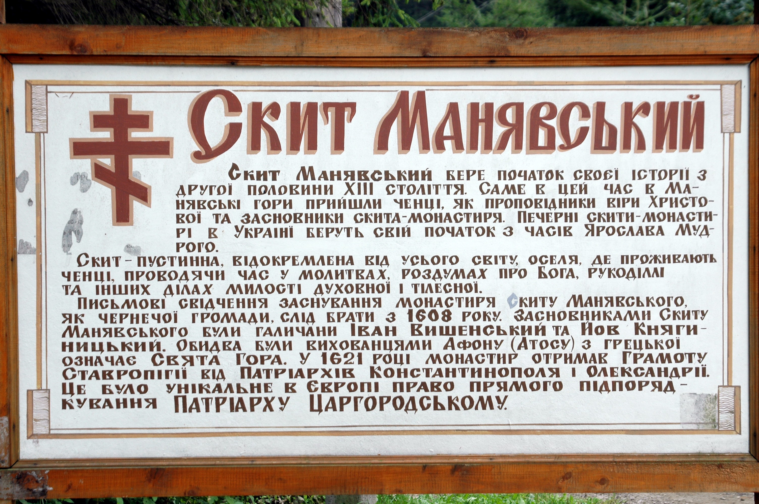 Монастир-скит (мур.):, с. Манява